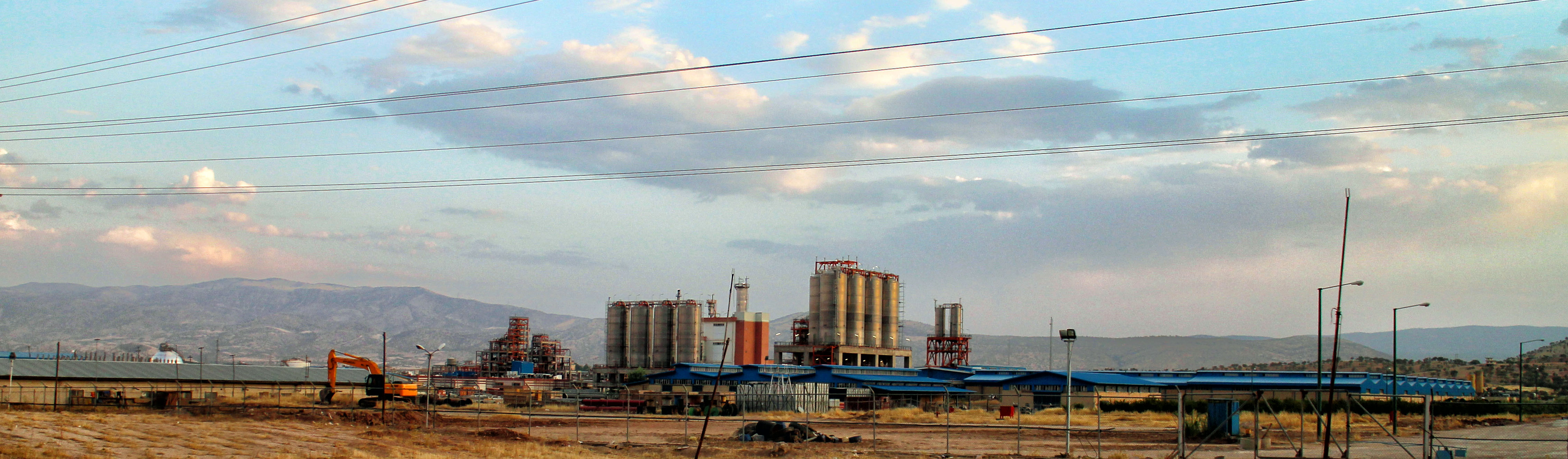 پتروشیمی خرم‌آباد